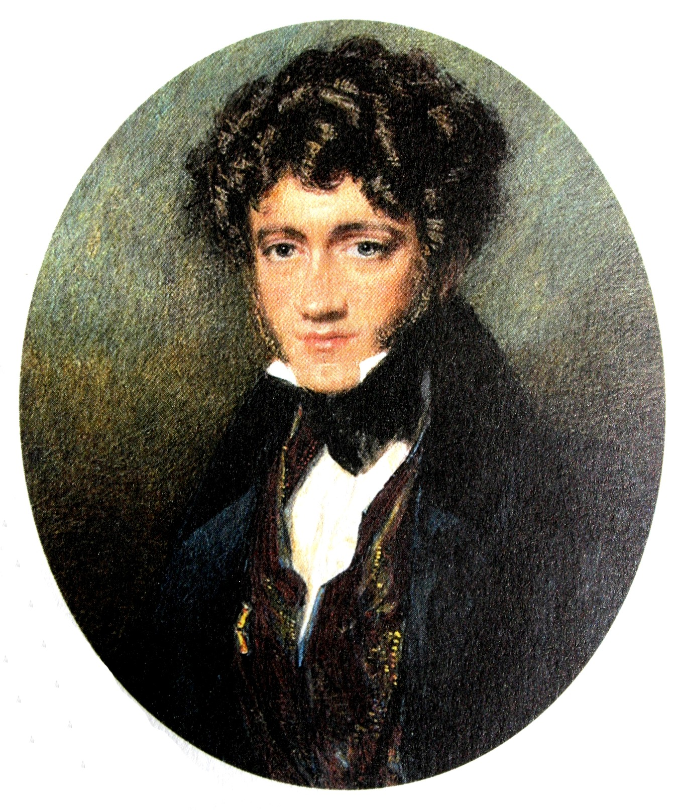 John Frederick William Herschel (1792-1871), astronomer